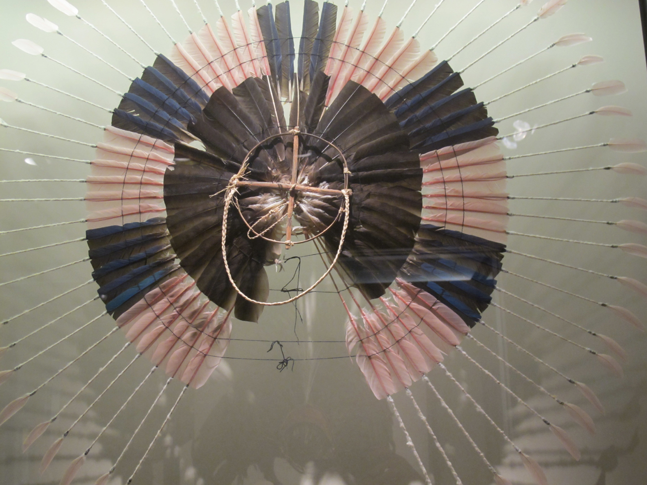 Rahareto, coiffe du peuple indigène karaja, Mato Grosso, Brésil. bois, rotin, plumes, fibres végétales. Collecte et don Jabiru Prod, 2002. Muséum d'histoire naturelle de La Rochelle. HO.9075